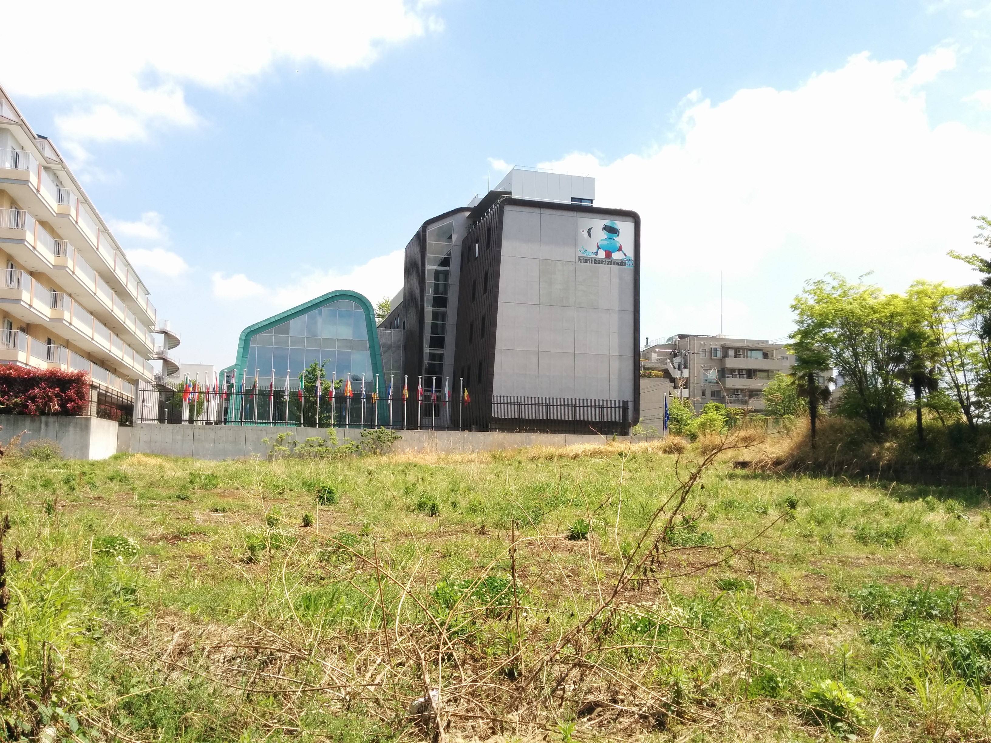 diplomatic mission